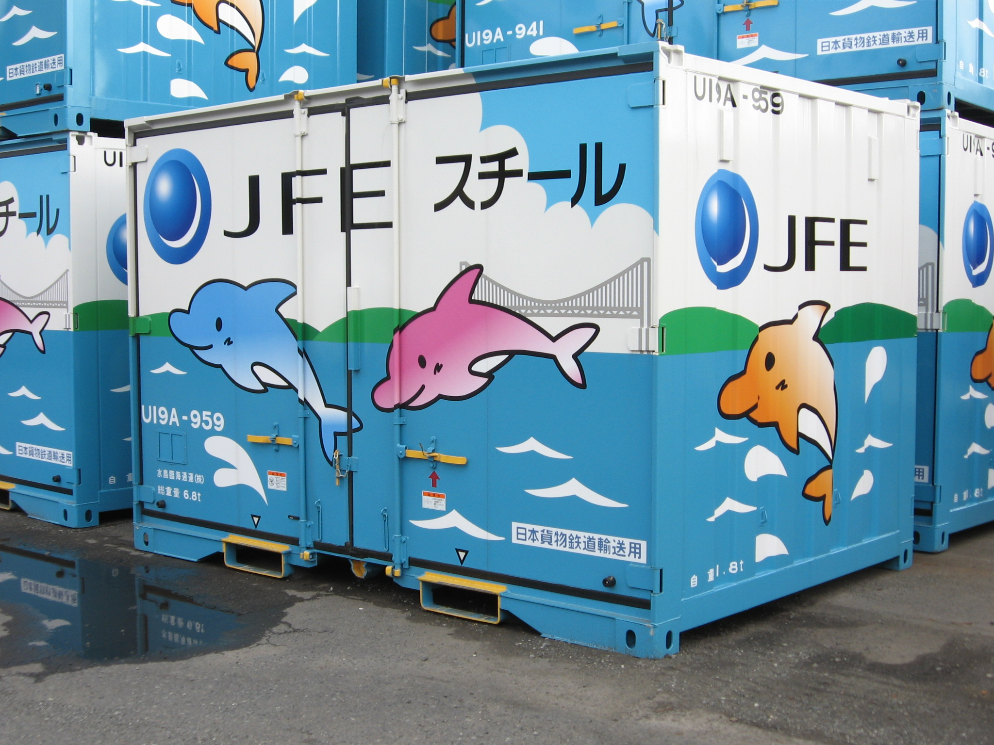 JR貨物より日本国内での鉄道輸送用に承認登録されて、民間企業が所有及び使用している 「 鉄道私有コンテナ 」 。 撮影地＝【岡山／東水島貨物駅】